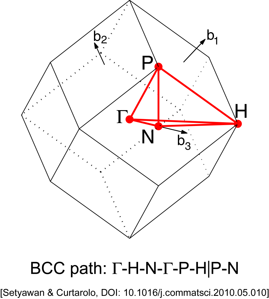 Curtarolo, consortium